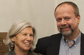 Luciana Civico in presenza del biografo lo storico Fabio Vitale che ne ha redatto la biografia.